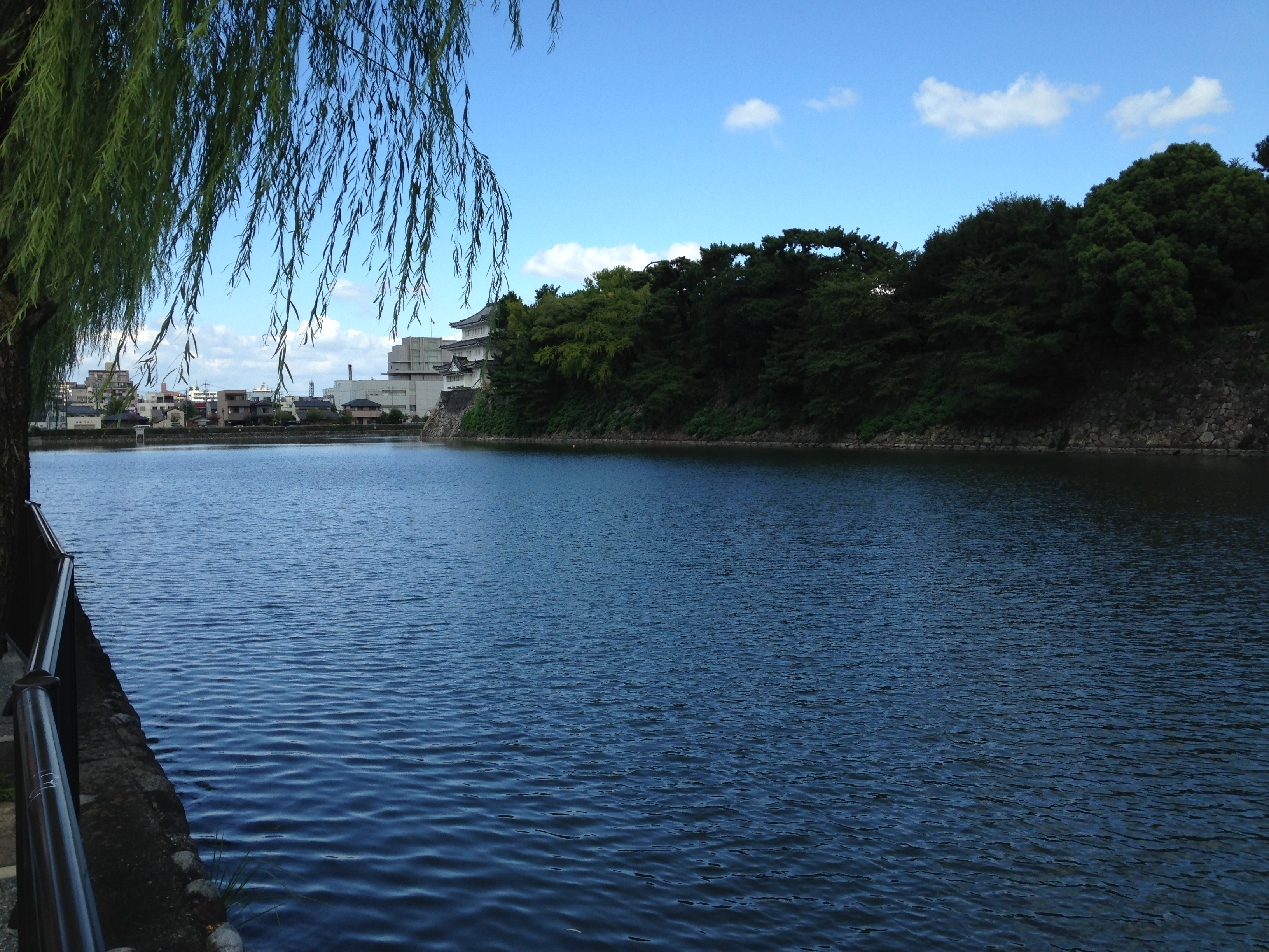 名古屋城の水堀